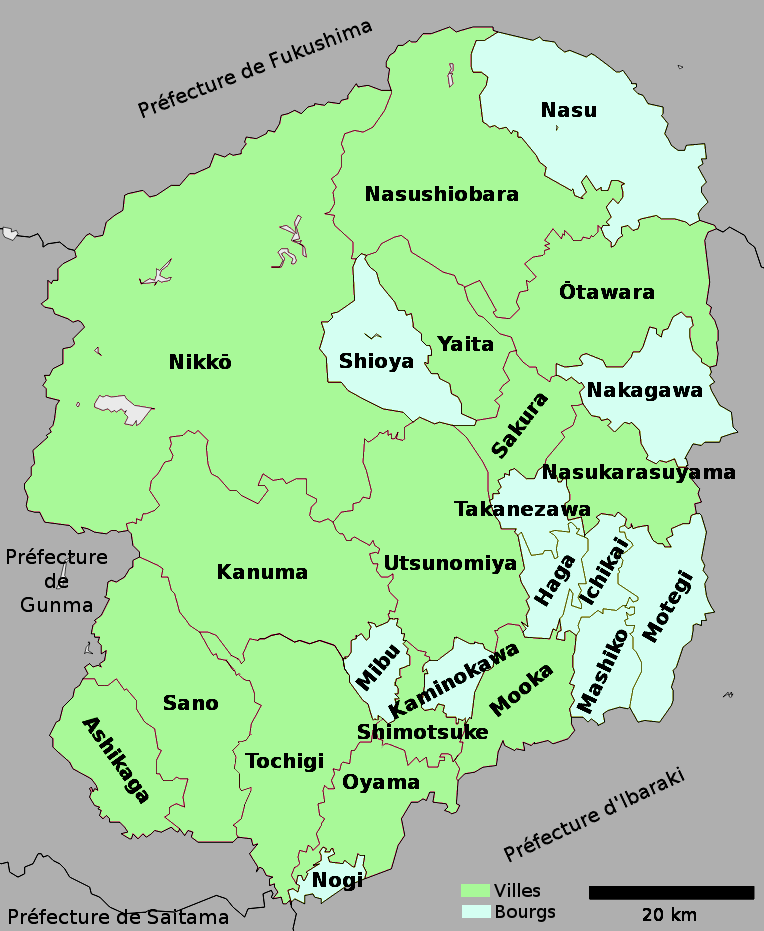 Japon : carte des municipalités de la préfecture de Tochigi (2017).